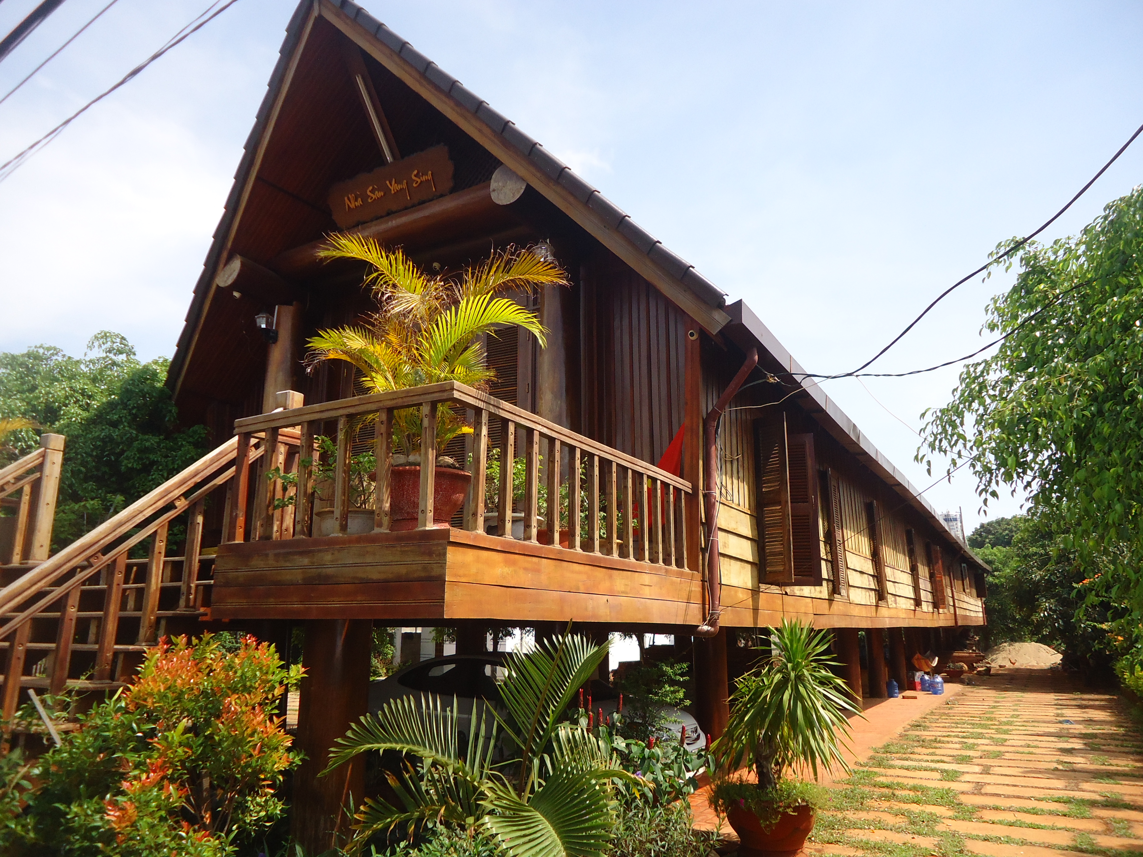 nha san yang sin ben hong